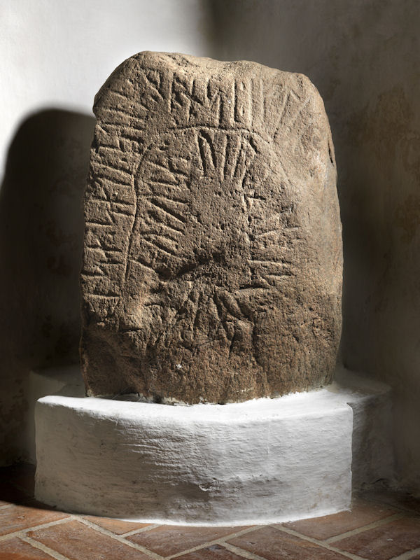 Sjørring-sten. Foto: Nationalmuseet ved Roberto Fortuna